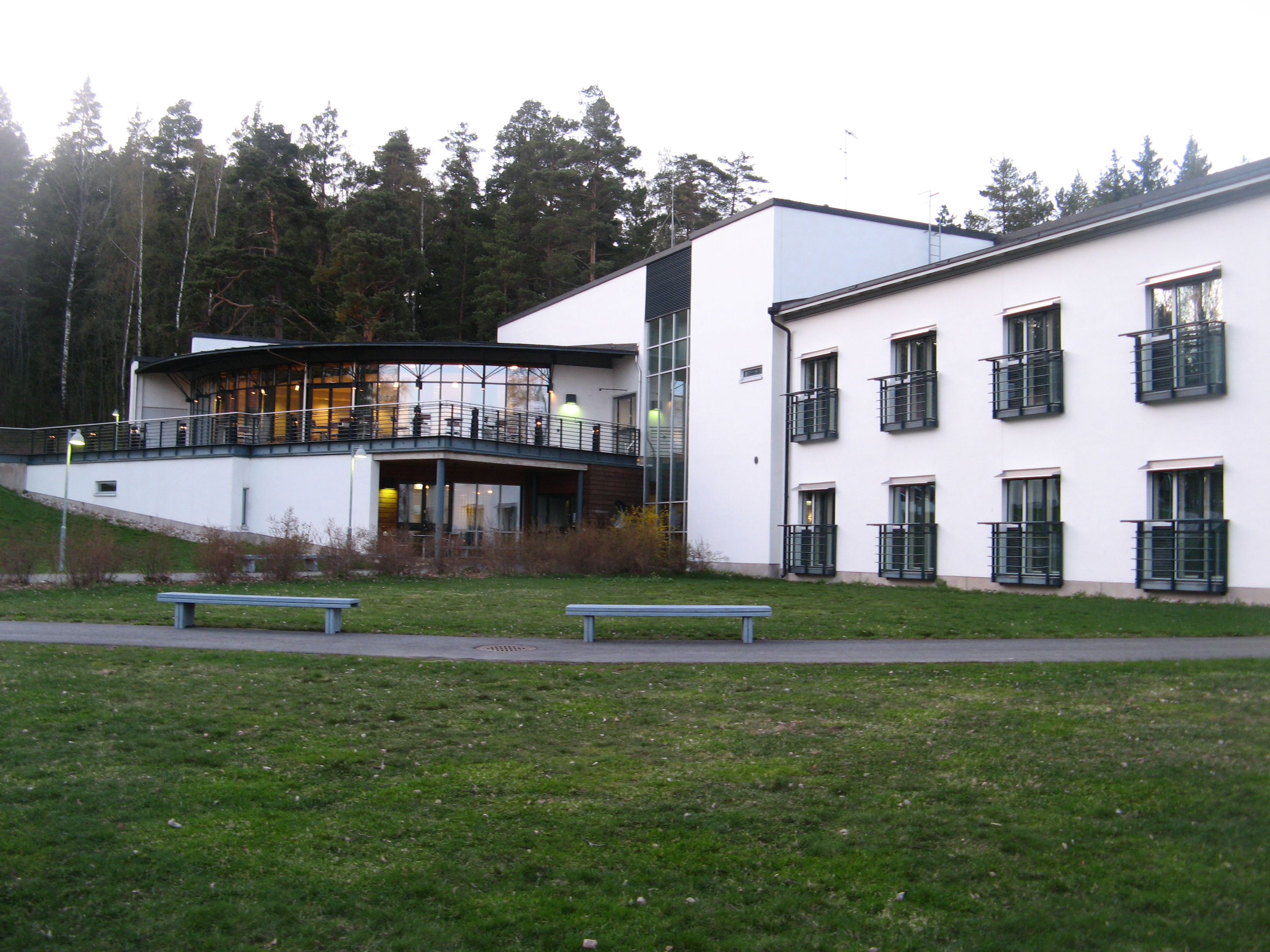 Huvudbyggnaden på Senaps kurs- och lägergård. Matsal till vänster, inkvarteringsutrymmen till höger.